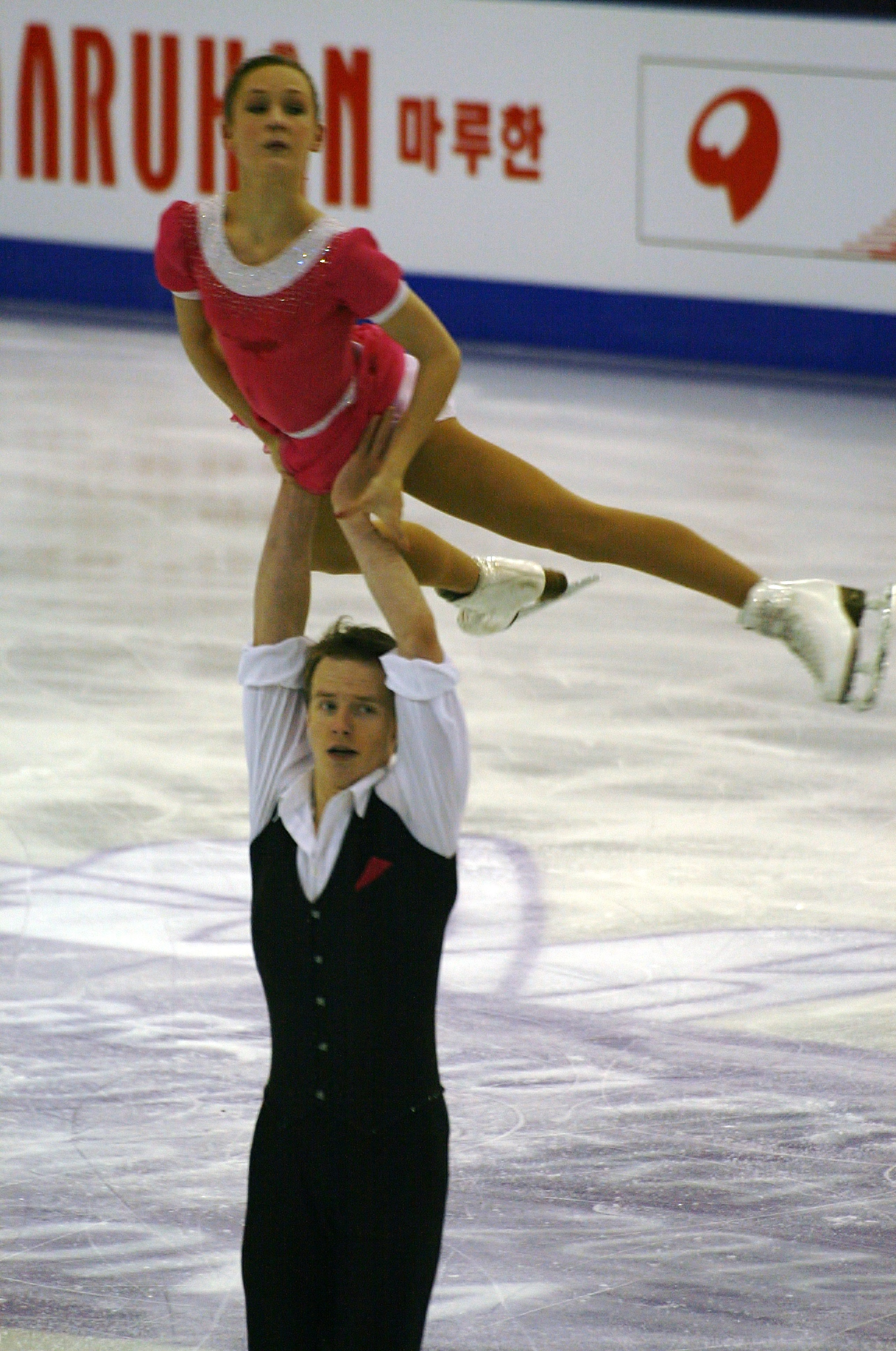 Амина Атаханова и Илья Спиридонов (Россия) на финале Гран-при по фигурному катанию среди юниоров 2015-2016.